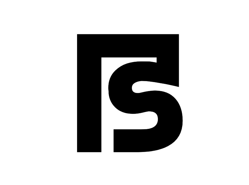 ഭ മലയാളം അക്ഷരം